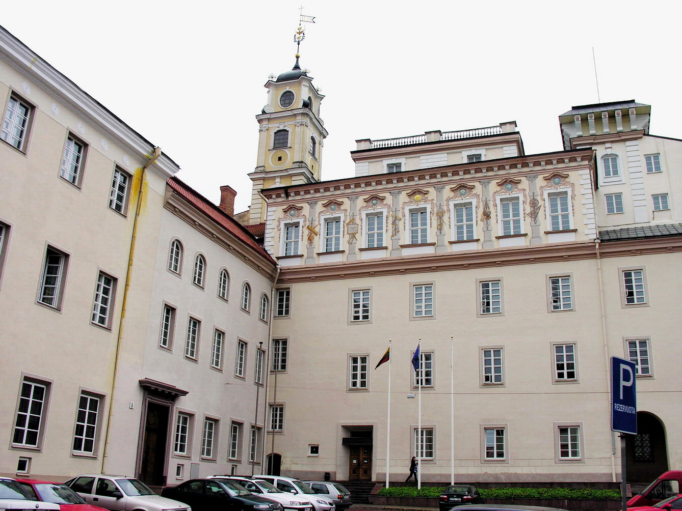 Vilniaus universitetas Centrinis įėjimas. Bibliotekos kiemo pietų pusė. Foto: Algirdas, 2006 m. rugpjūčio 8 d., Lietuva